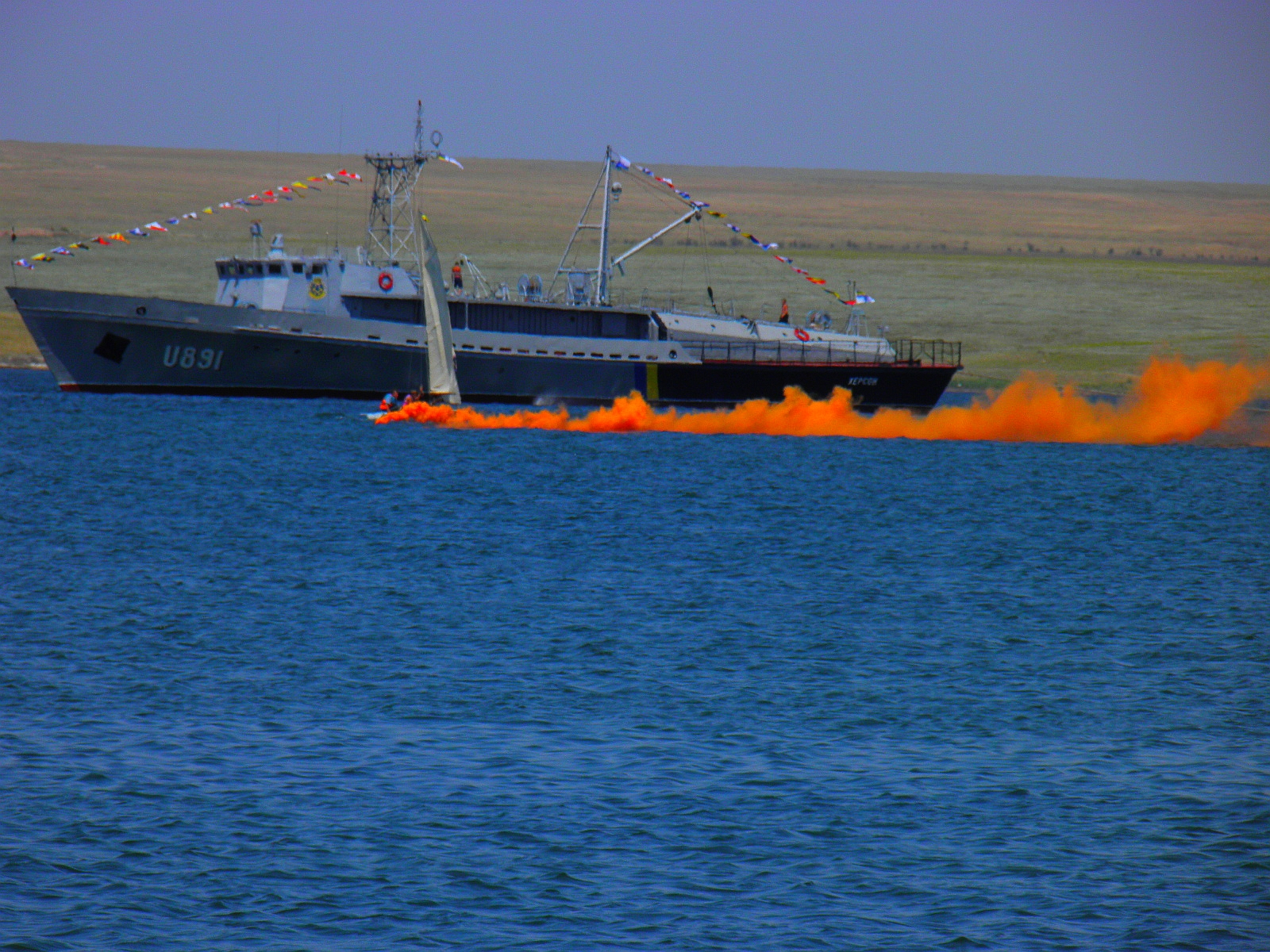 u891 Катер-торпедолов «Херсон»